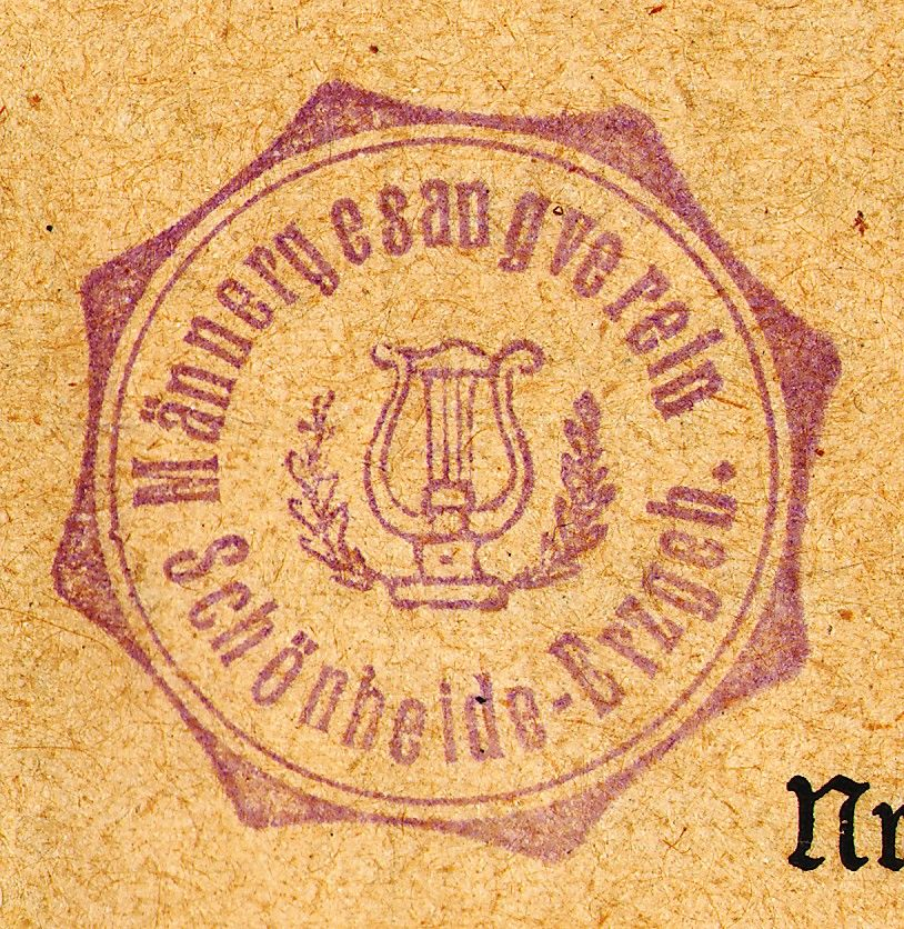 Schönheide im Erzgebirge: In einem Liederbuch aus der Zeit um den Ersten Weltkrieg (Tongers Taschen-Musik-Album Nr. 56, 118 Volkslieder für gemischten Chor, Verlag P. J. Tonger, Köln, ohne Angabe des Erscheinungsjahres) sind auf den Umschlägen und dem Innentitel eine Reihe von Besitzstempeln noch gut zu lesen: „Männergesangverein Schönheide – Erzgeb.“ In der Mitte des Stempels finden sich eine Lyra – für die Göttin des Gesangs – und Florales.